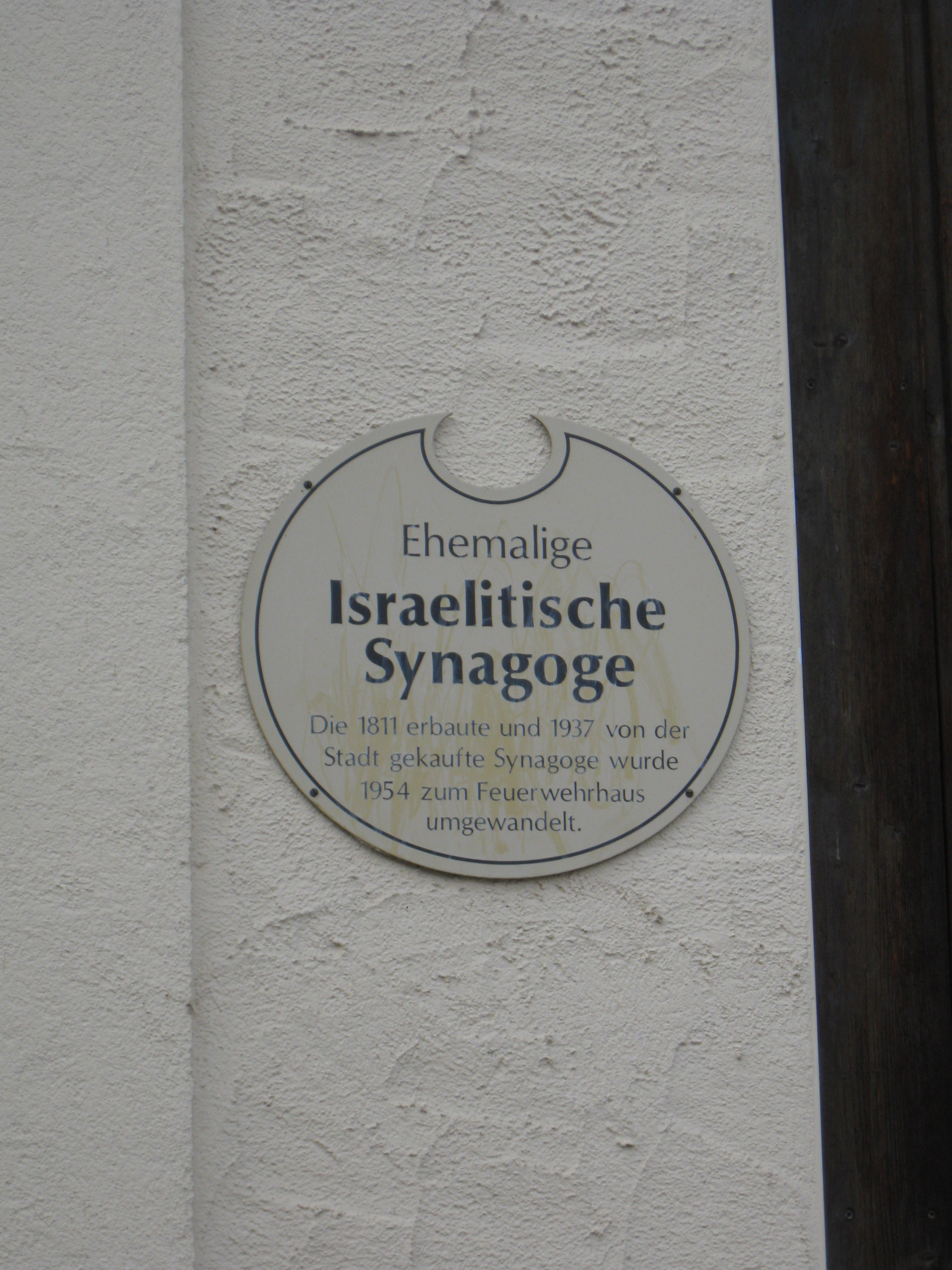 Pappenheim